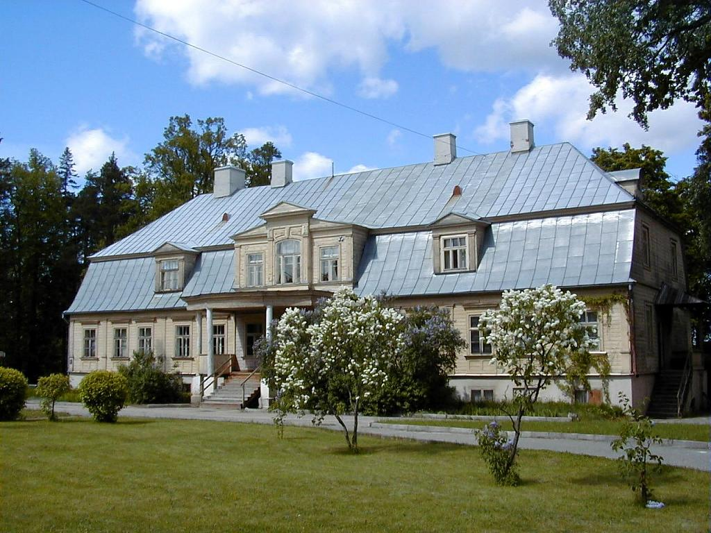 Jāņmuižas pils 2001-05-26